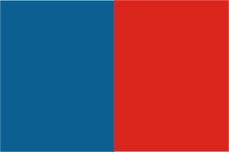 Bandera de Narbona